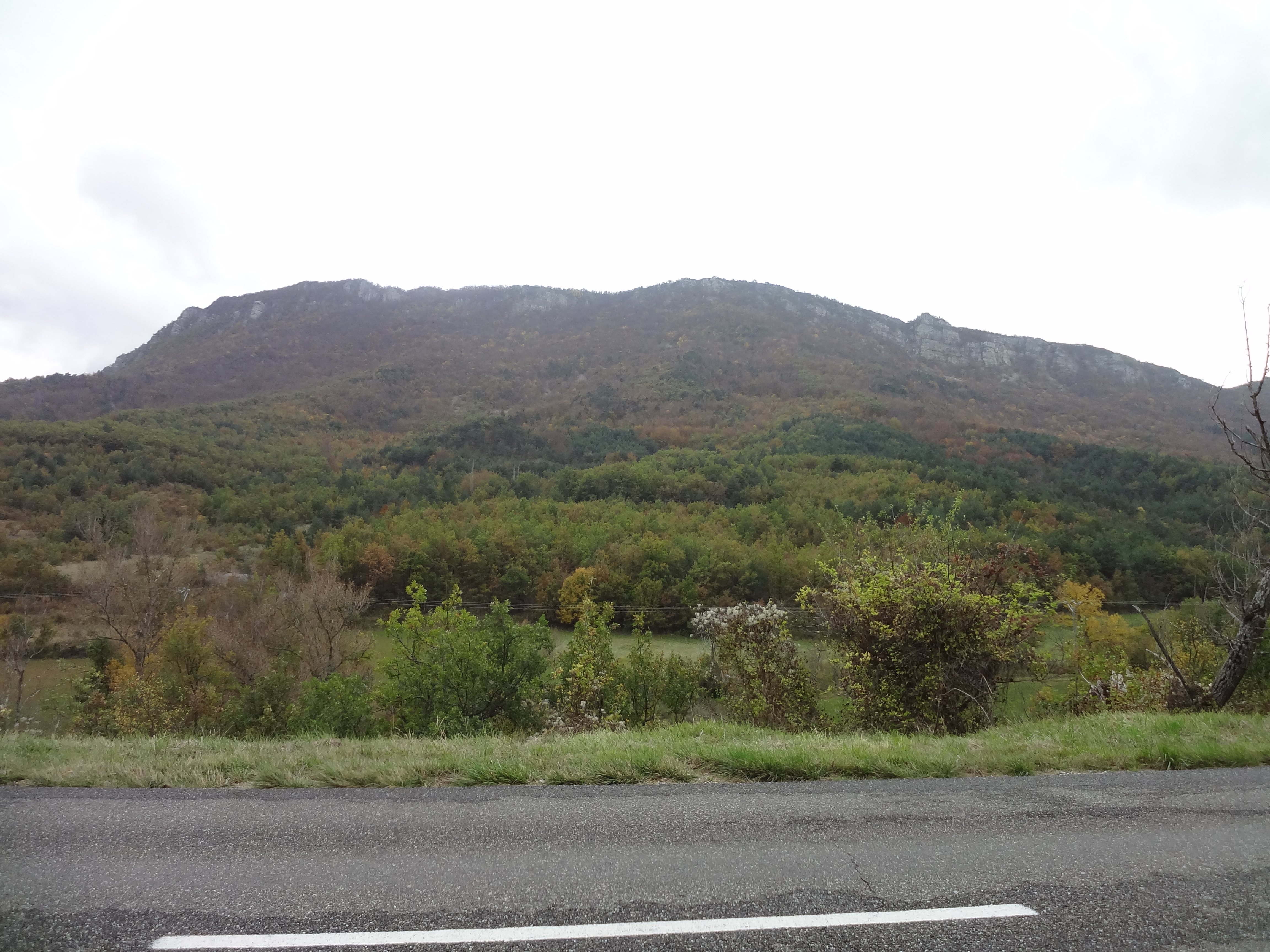 Ubac de la crête des Blaches de Paillar, limitrophe entre Curel et Montfroc (Alpes de Haute Provence et Drôme, Sud de la France), vu de la vallée du Jabron (cf route).